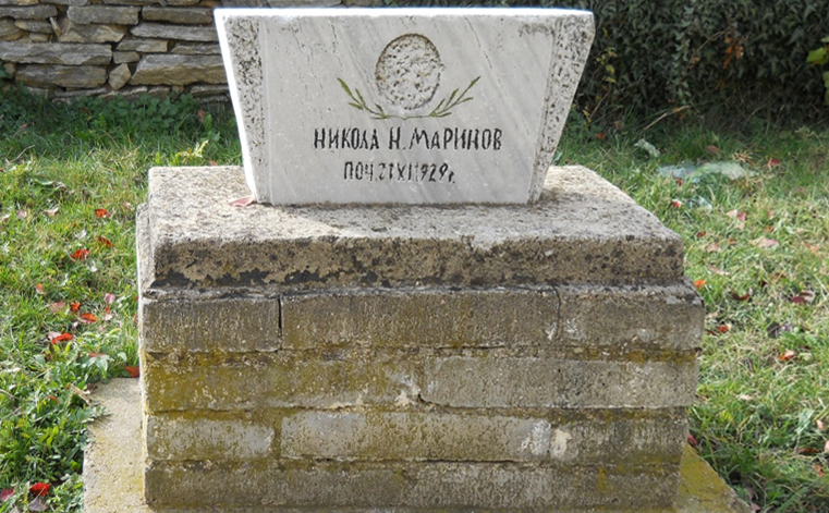 Паметник на първият учител на Основно Училище „Св. Св. Кирил и Методий” - с. Туховища, поставен в двора на училището.